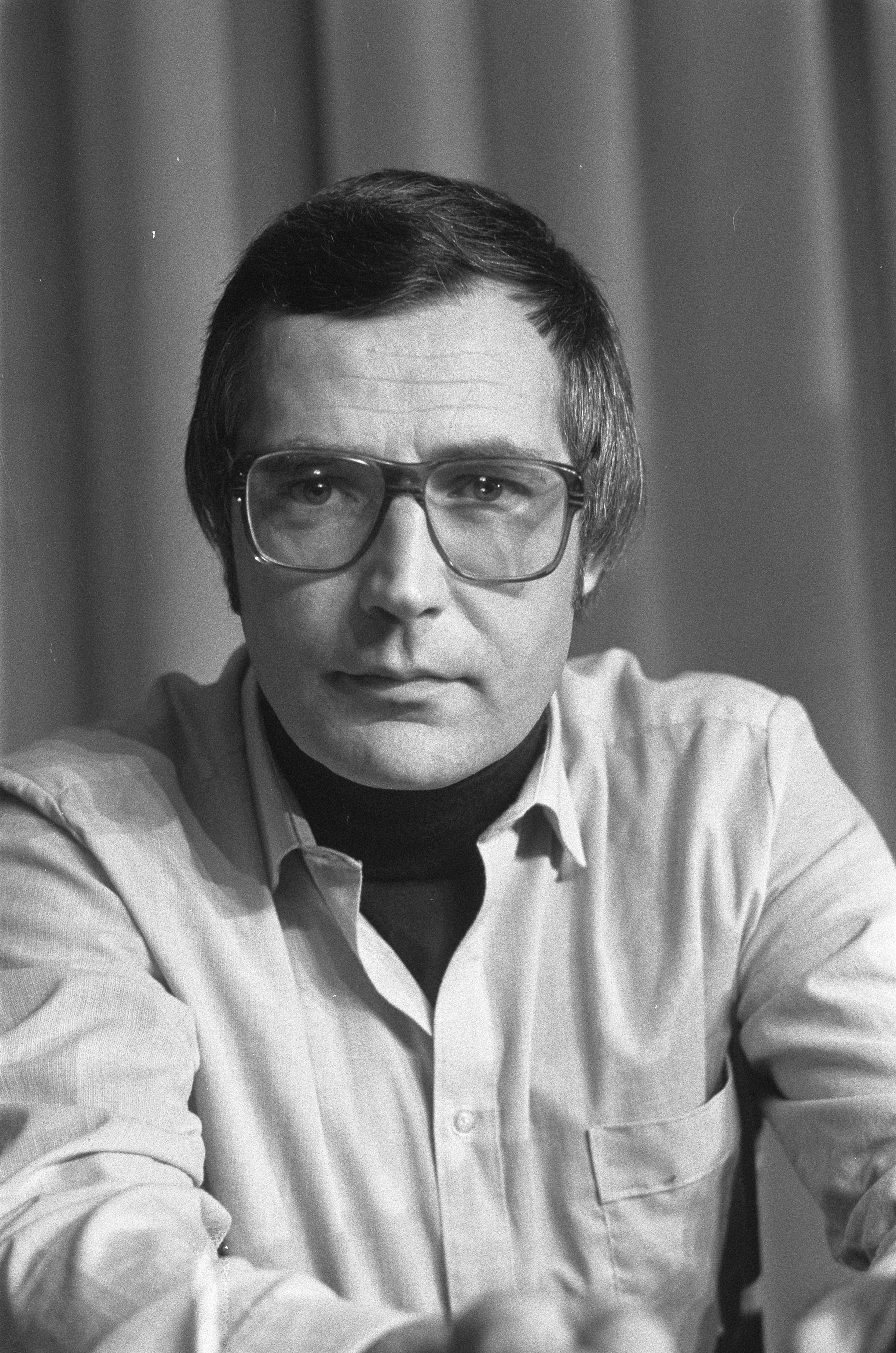 Collectie / Archief : Fotocollectie Anefo Reportage / Serie : Buitengewone vergadering in Amsterdam van de gezamelijke politiebonden Beschrijving : Leen van der Linden (voorzitter Nederlandse Politiebond) Datum : 7 december 1981 Locatie : Amsterdam, Noord-Holland Trefwoorden : politie, portretten, vakbonden, voorzitters Persoonsnaam : Linden, Leen van der Fotograaf : Croes, Rob C. / Anefo Auteursrechthebbende : Nationaal Archief Materiaalsoort : Negatief (zwart/wit) Nummer archiefinventaris : bekijk toegang 2.24.01.05 Bestanddeelnummer : 931-8461